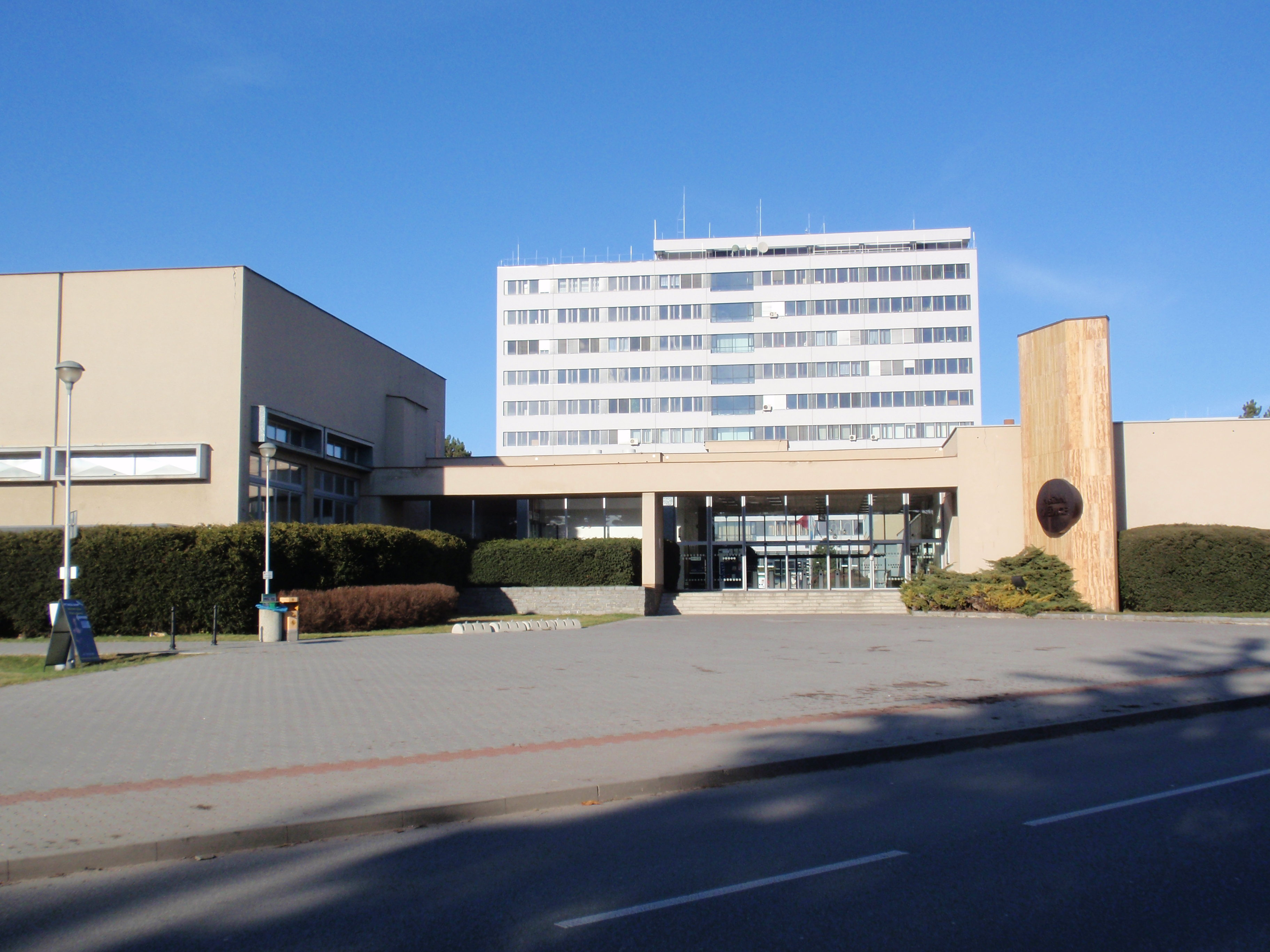 Dědice, areál vojenských škol v Dědicích, Kasárna Dědice, vstup